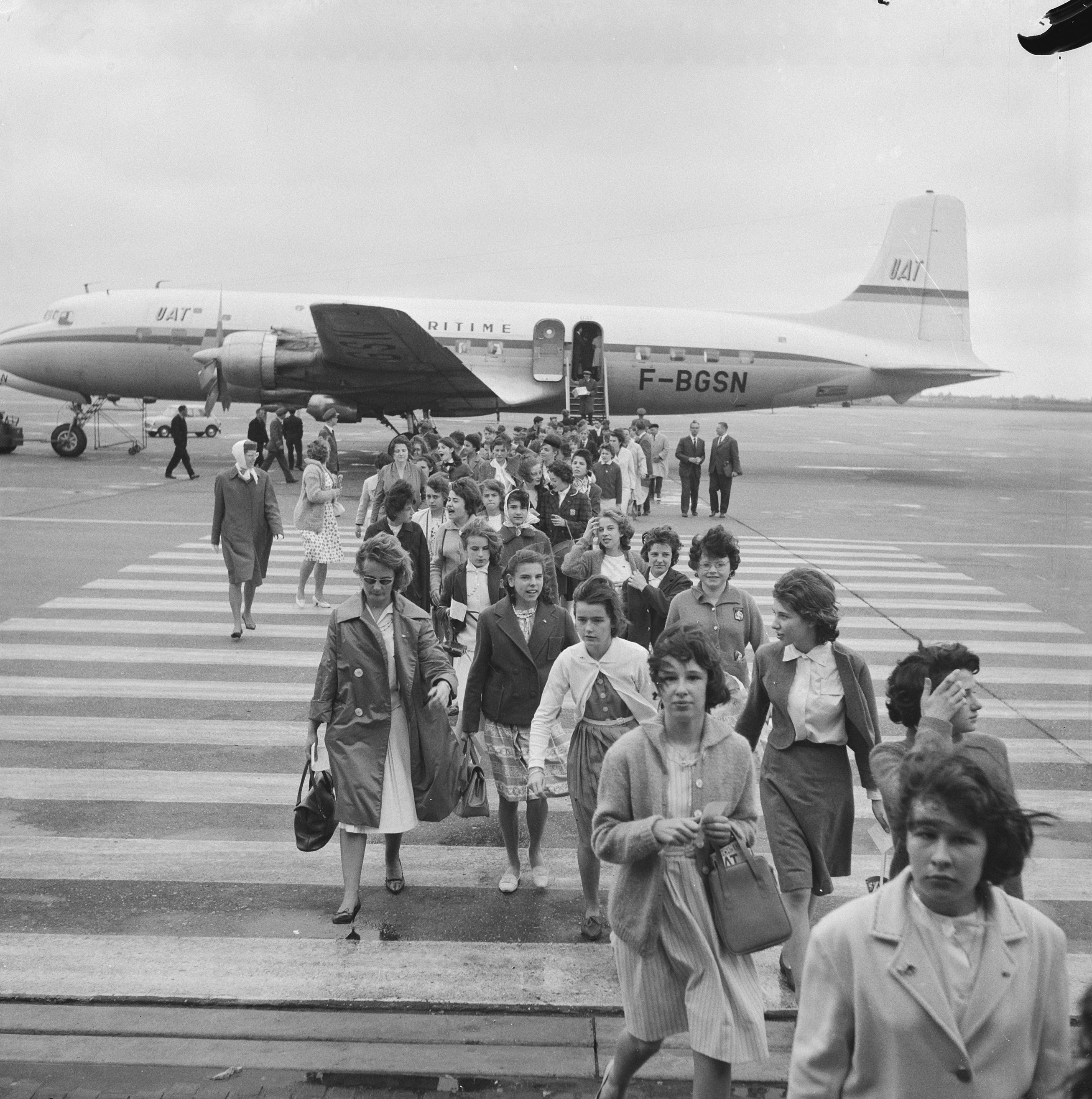 Collectie / Archief : Fotocollectie Anefo Reportage / Serie : [ onbekend ] Beschrijving : Eendagsschoolreisje per vliegtuig voor kinderen uit de Parijse voorsteden Datum : 19 juni 1962 Trefwoorden : Kinderen, vliegtuigen Fotograaf : Nijs, Jac. de / Anefo Auteursrechthebbende : Nationaal Archief Materiaalsoort : Negatief (zwart/wit) Nummer archiefinventaris : bekijk toegang 2.24.01.03 Bestanddeelnummer : 914-0398